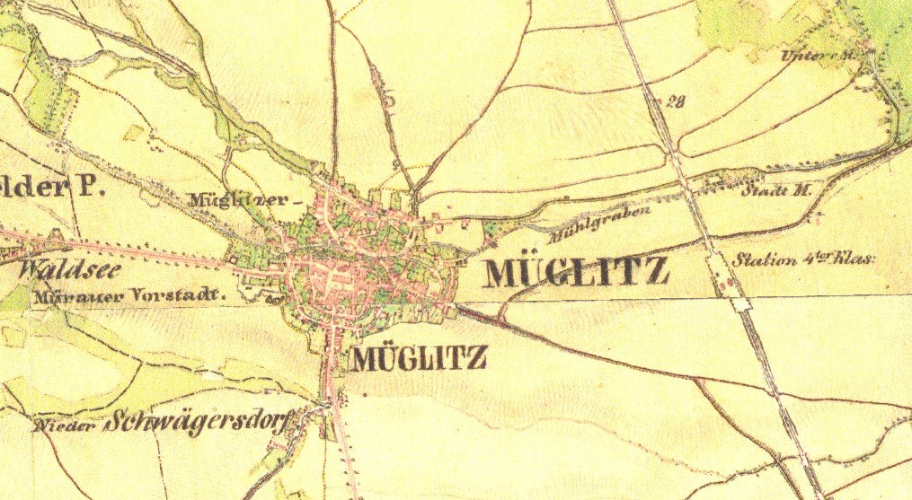 historická mapa Mohelnice, pořízená během II. vojenského mapování v letech 1836-1852